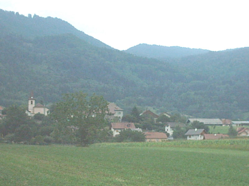 Photo personnelle du village de Cervens (Haute-Savoie, France)